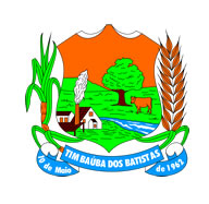 Brasão Timbauba dos Batistas